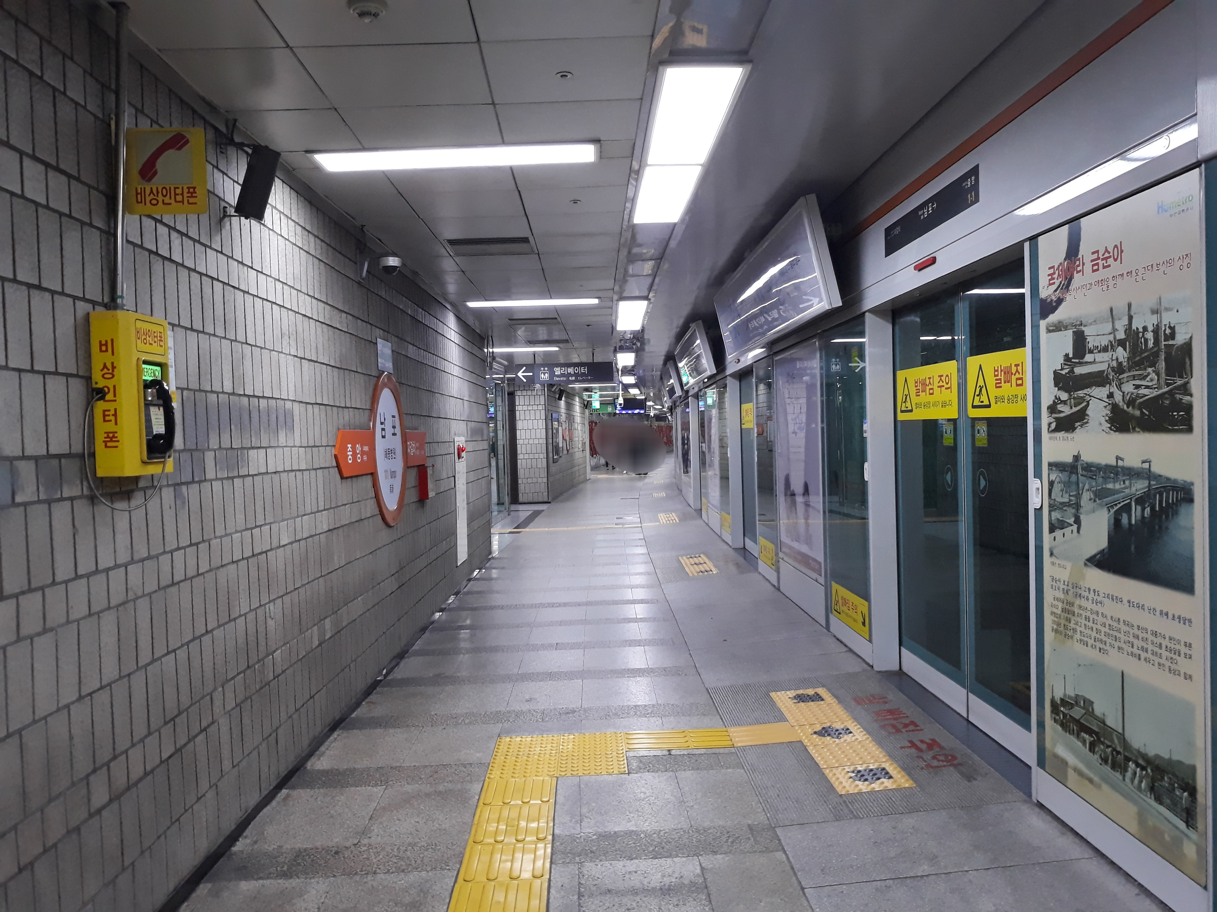 부산 도시철도 1호선 남포역 노포 방면 승강장